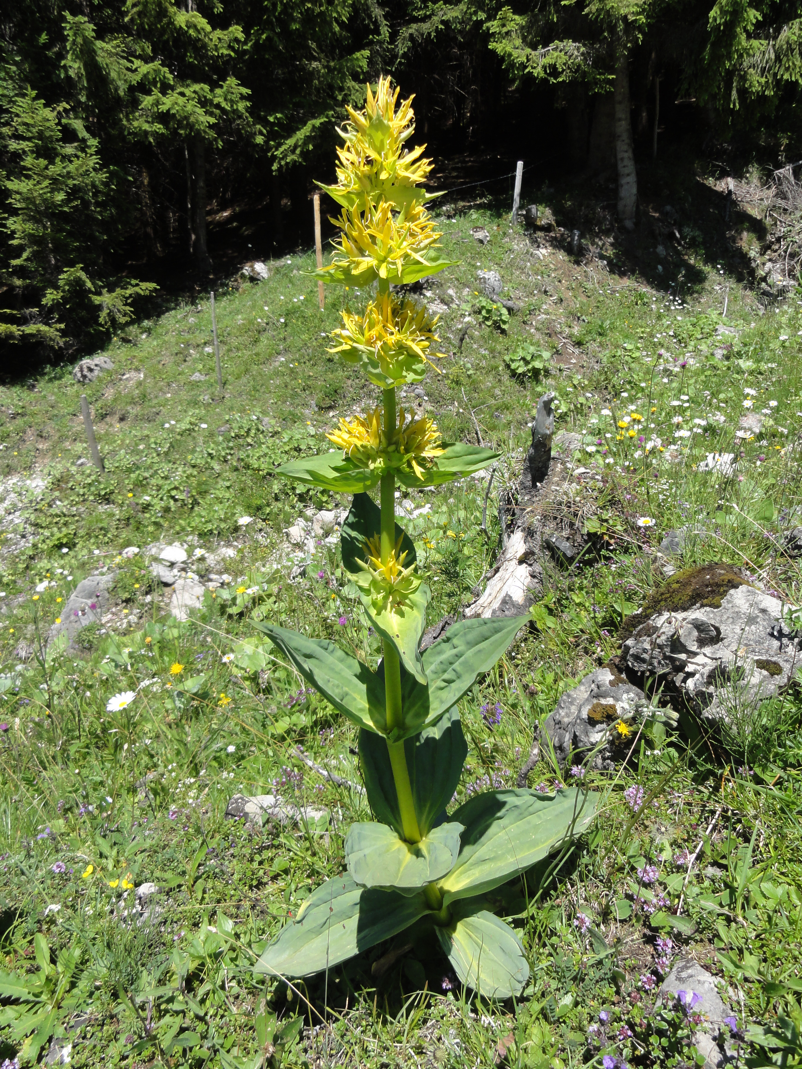 Gelber Enzian, Gentianaceae, Deutschland, Bayern, Allgäu, Oberstdorf Photo: U.Schmidt VII.2011